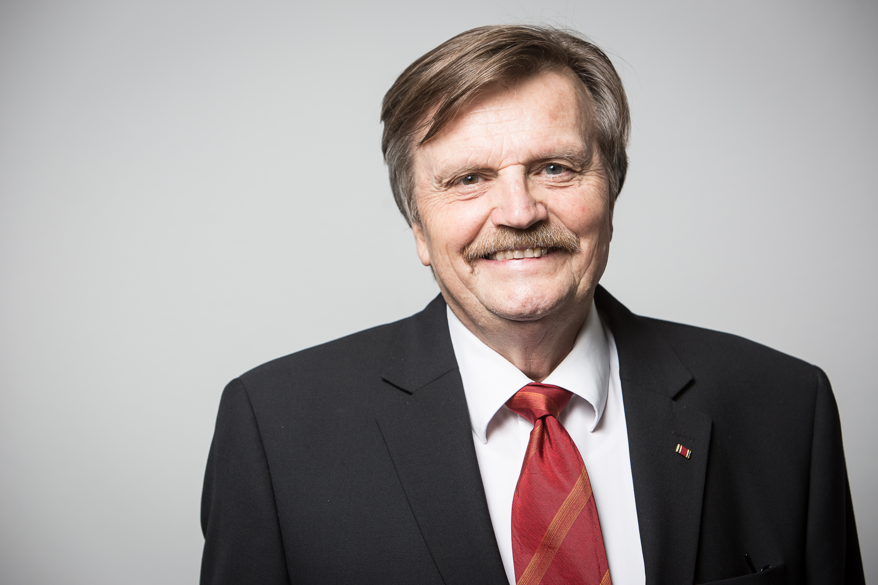 Portrait von Dr. Bernhard Conrads als Erster Vizepräsident von Special Olympics Deutschland e.V. (2014)